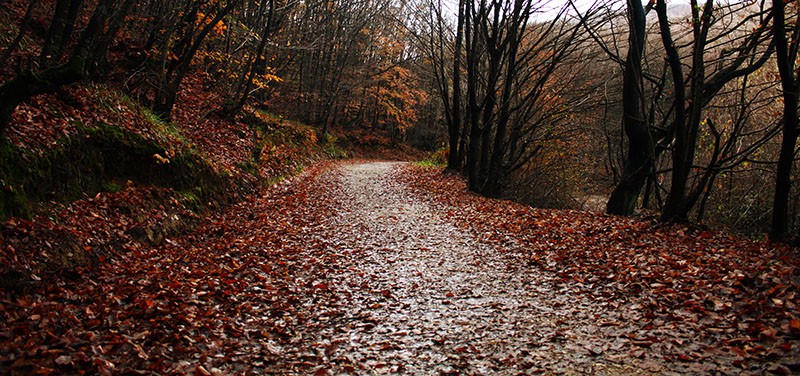 Adampol